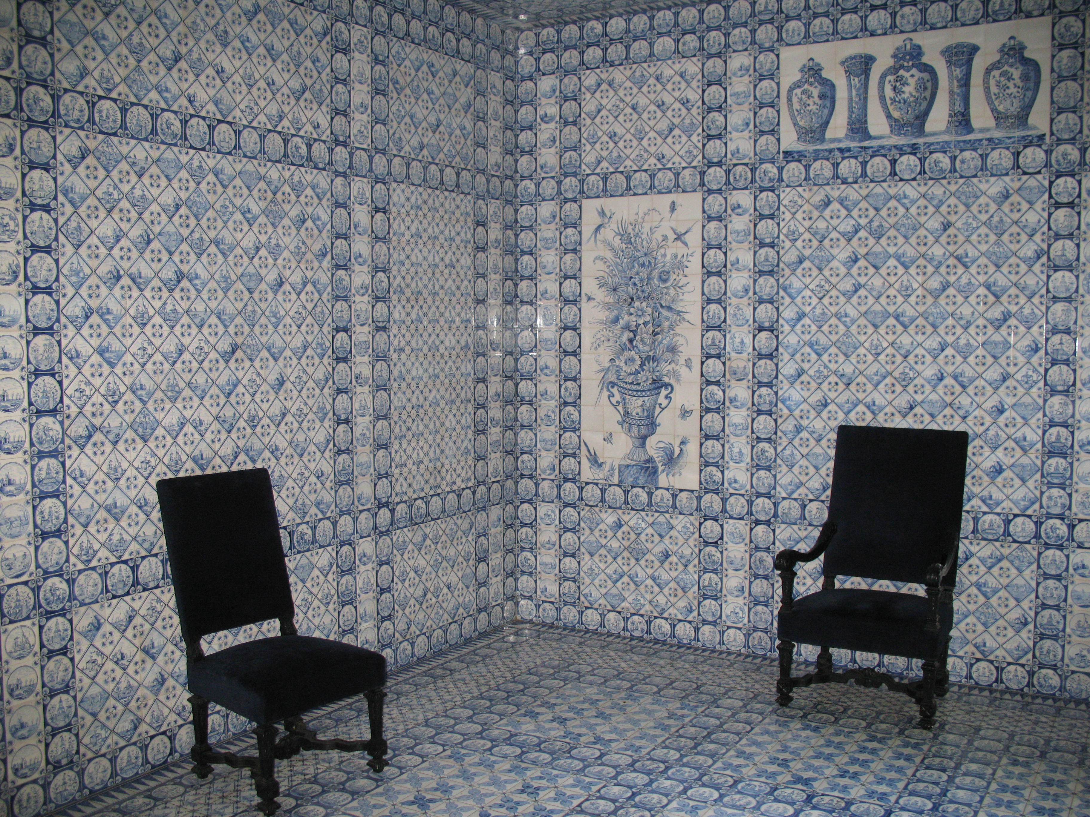 Château de Groussay à Montfort-l'Amaury (France) - la salle dite tente tartare abrite 10.000 carreaux de Delft